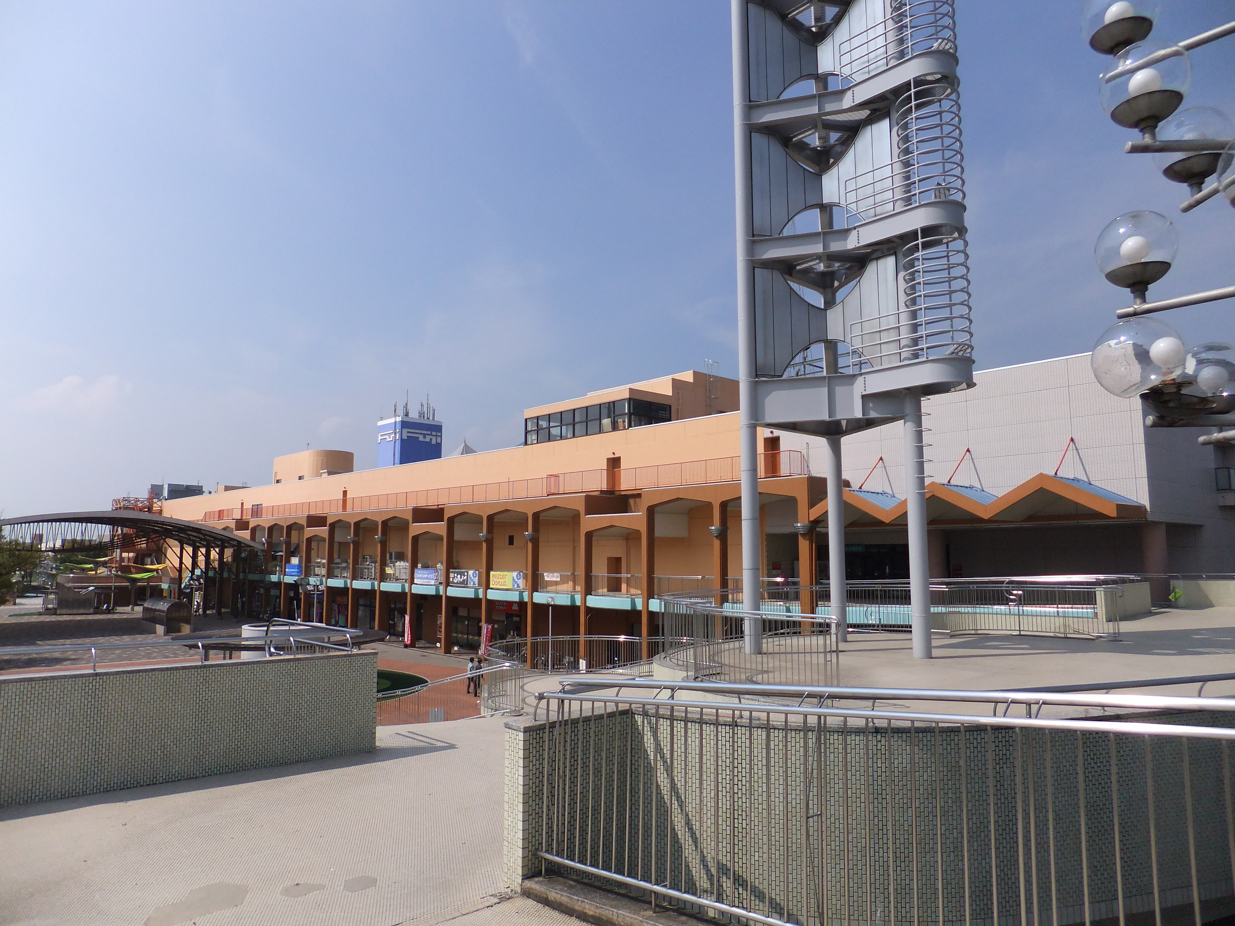 フジグラン高陽